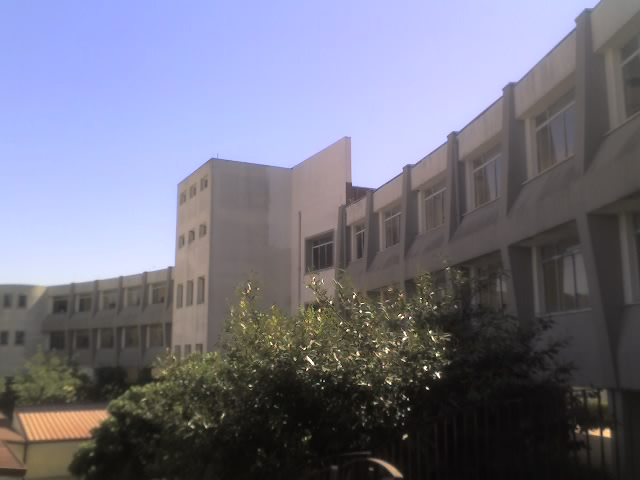 Il liceo Borrelli a Santa Severina (KR).